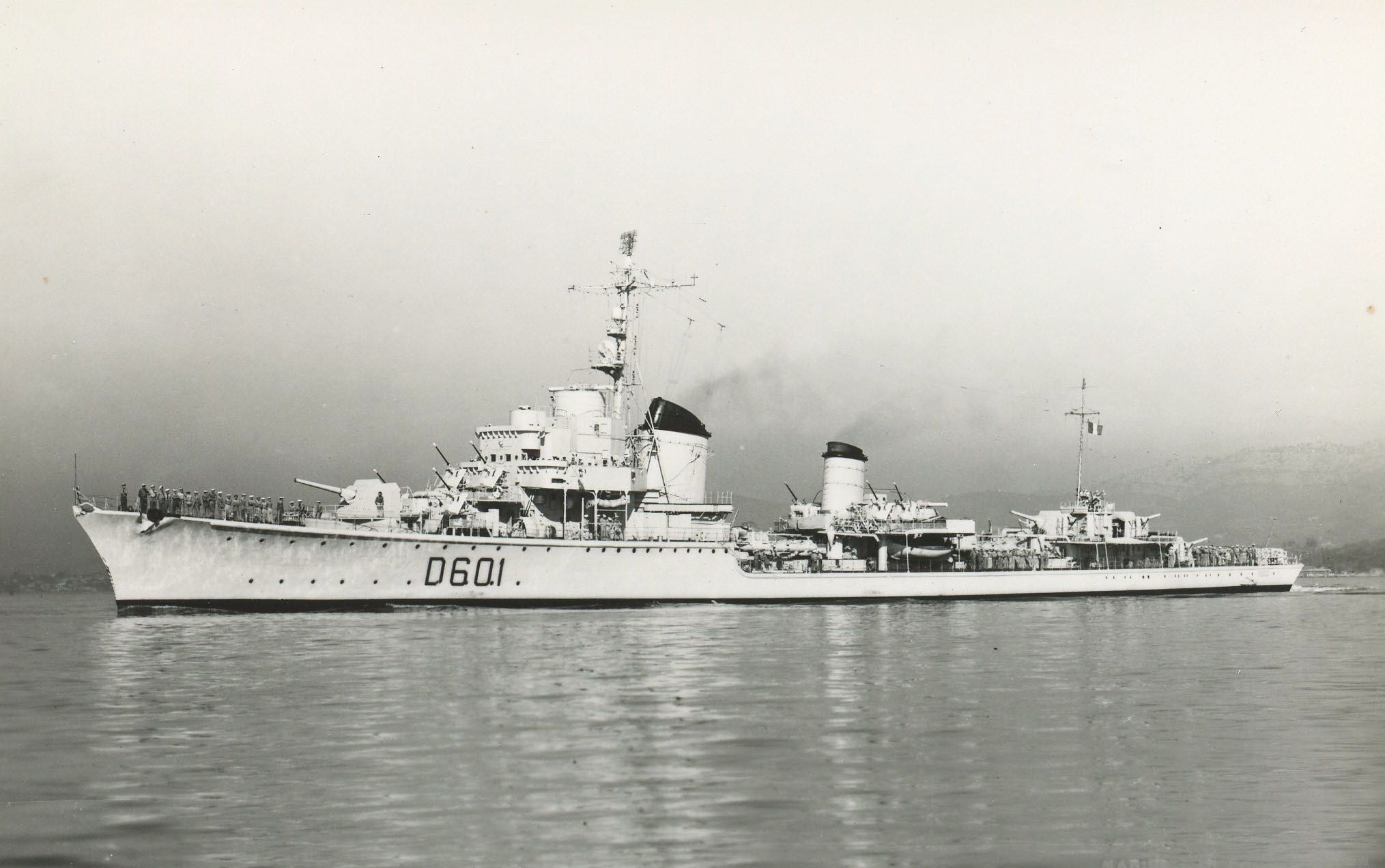 Destroyer Marceau ex-destroyer de la kriegsmarine Z 31